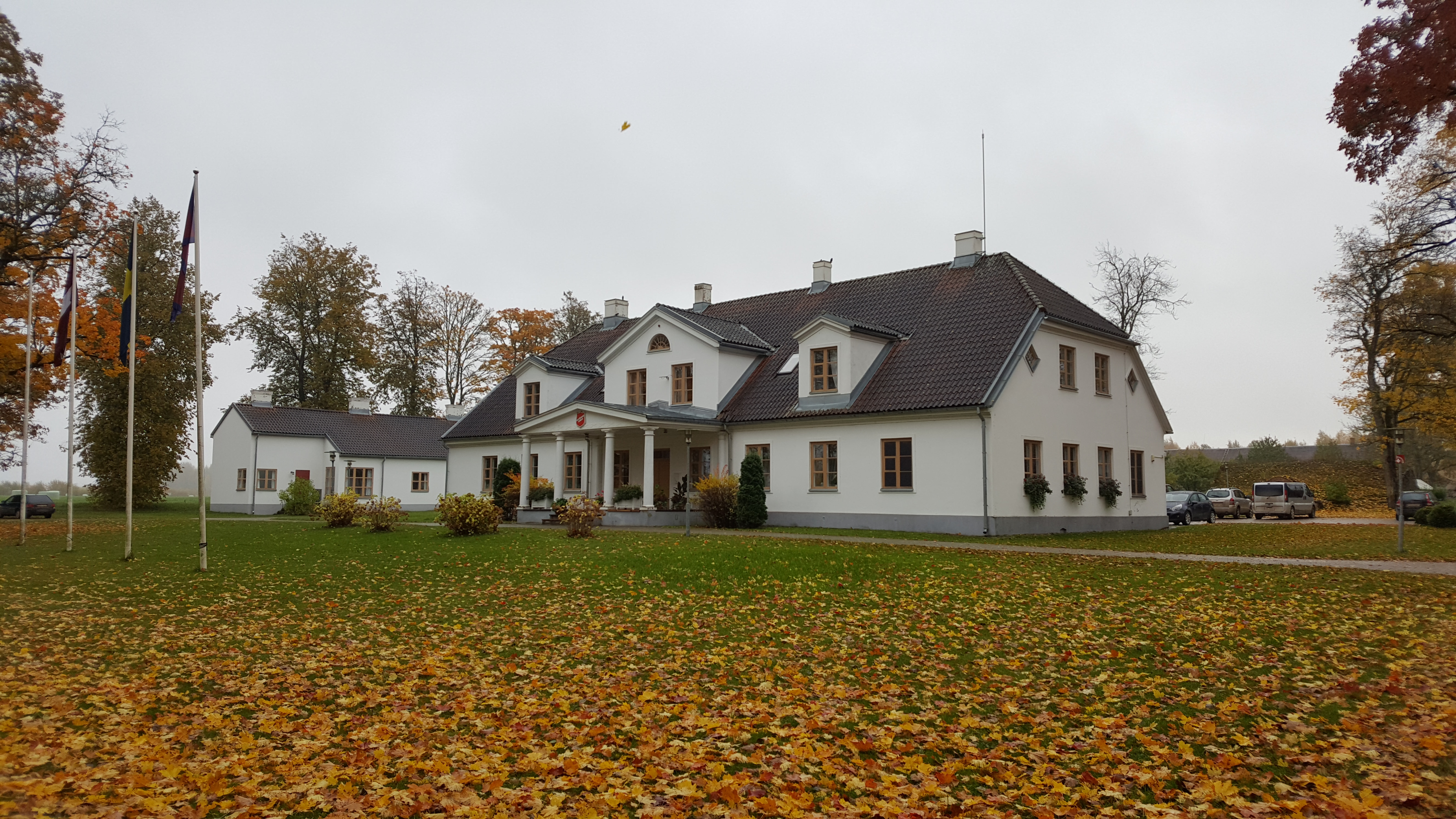 Skangali mõisa häärber 2017. aastal.